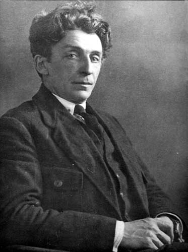 Флориан Флорианович Федорович (11 ноября 1876, Казань — 28 ноября 1928, Оренбург) — эсер, член ЦК ПСР, делегат Всероссийского Учредительного собрания, глава Политцентра.